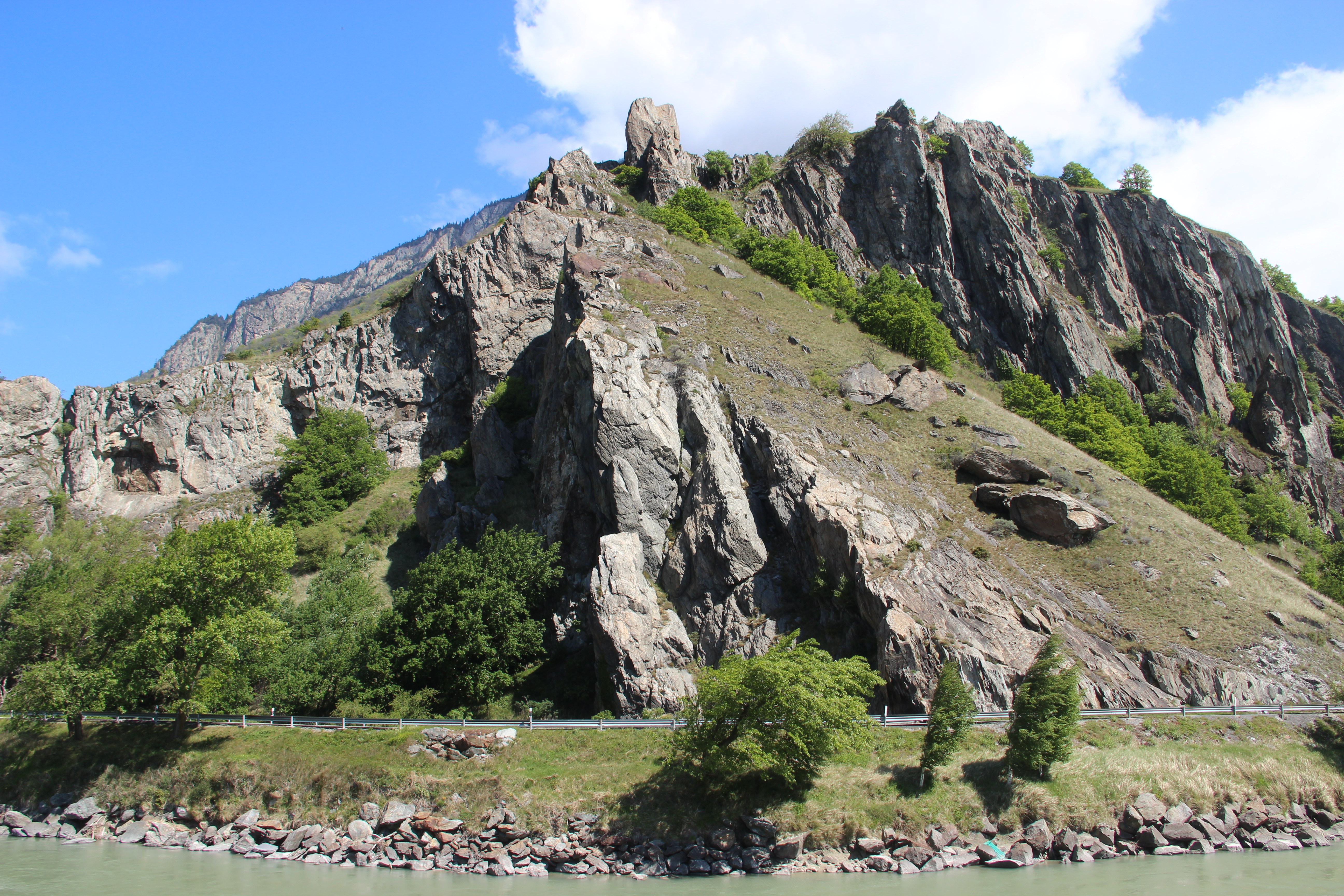 A66 Les Follatères